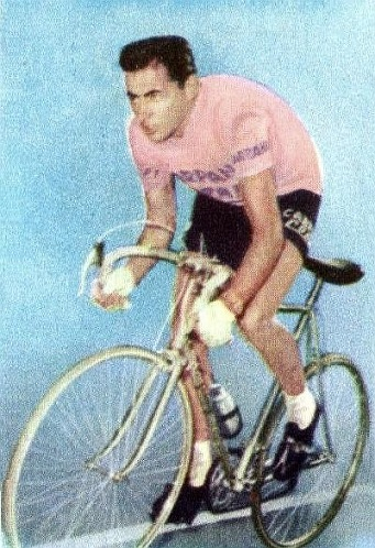 Fausto Coppi en 1952-53 - Campioni dello Sport 1967-1968, n°283